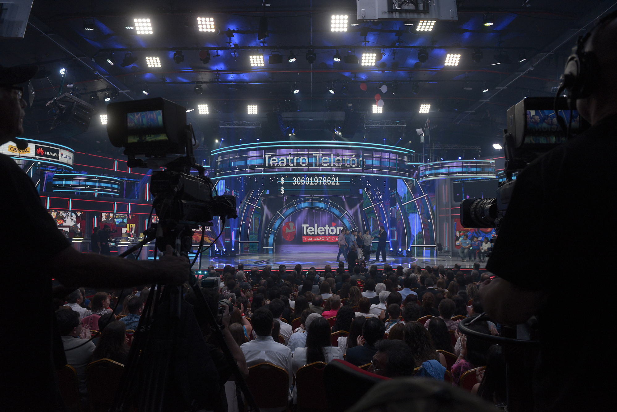 02 Diciembre 2016, Ministra Paula Narváez asiste a ceremonia de inauguración de Teleton 2016.